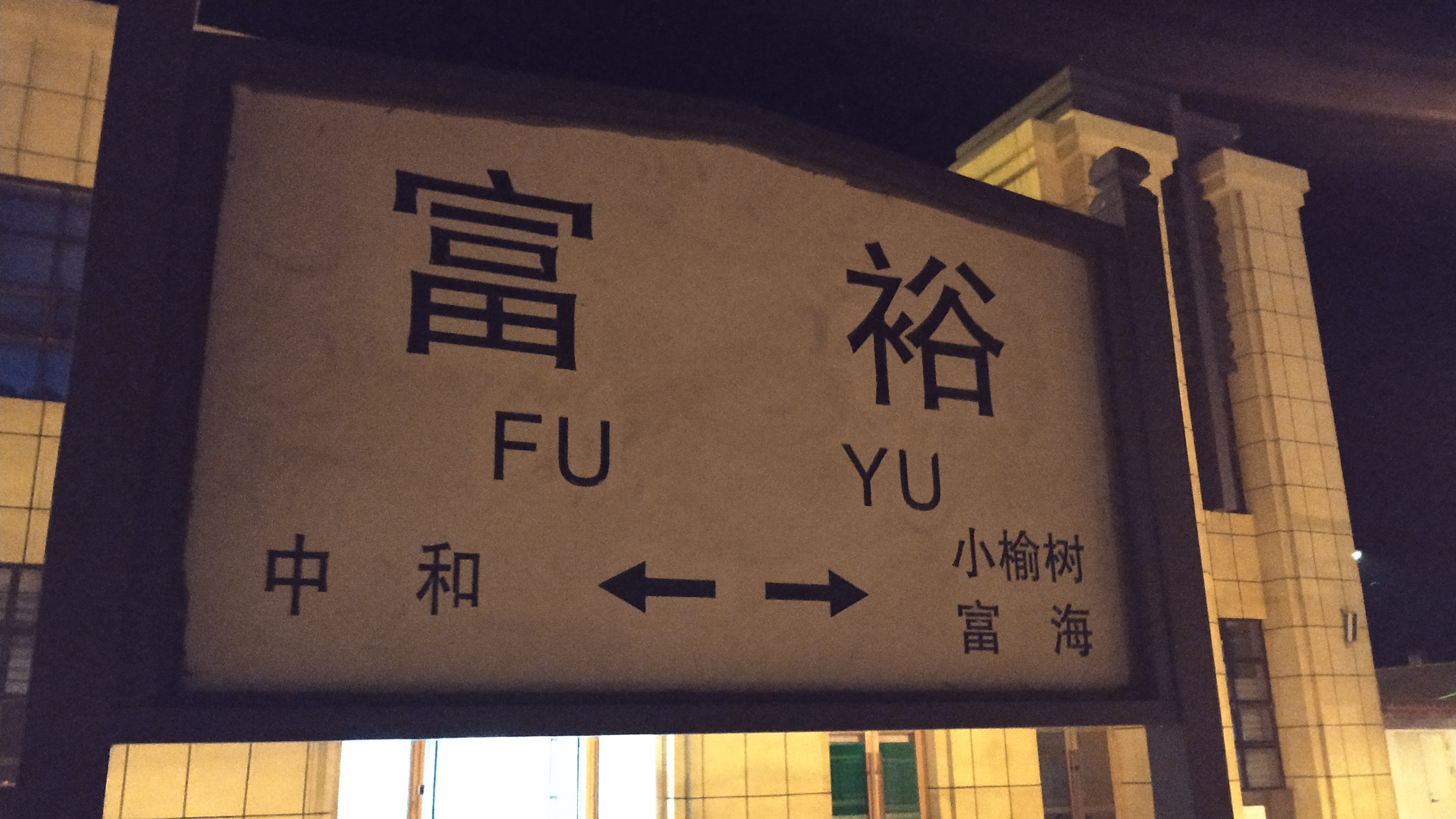 中文（中国大陆）: 富裕火车站